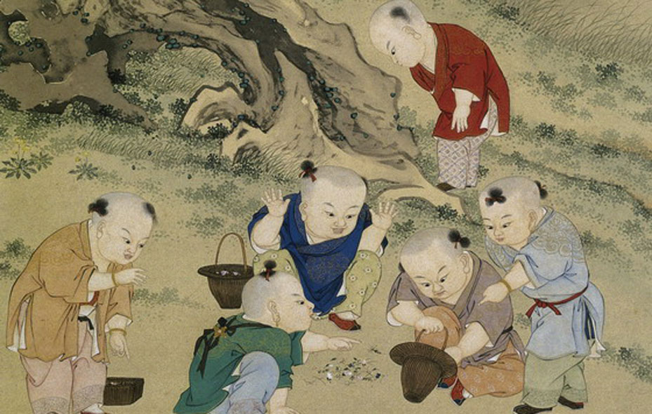 中文（香港）: 端午鬥百草遊戲